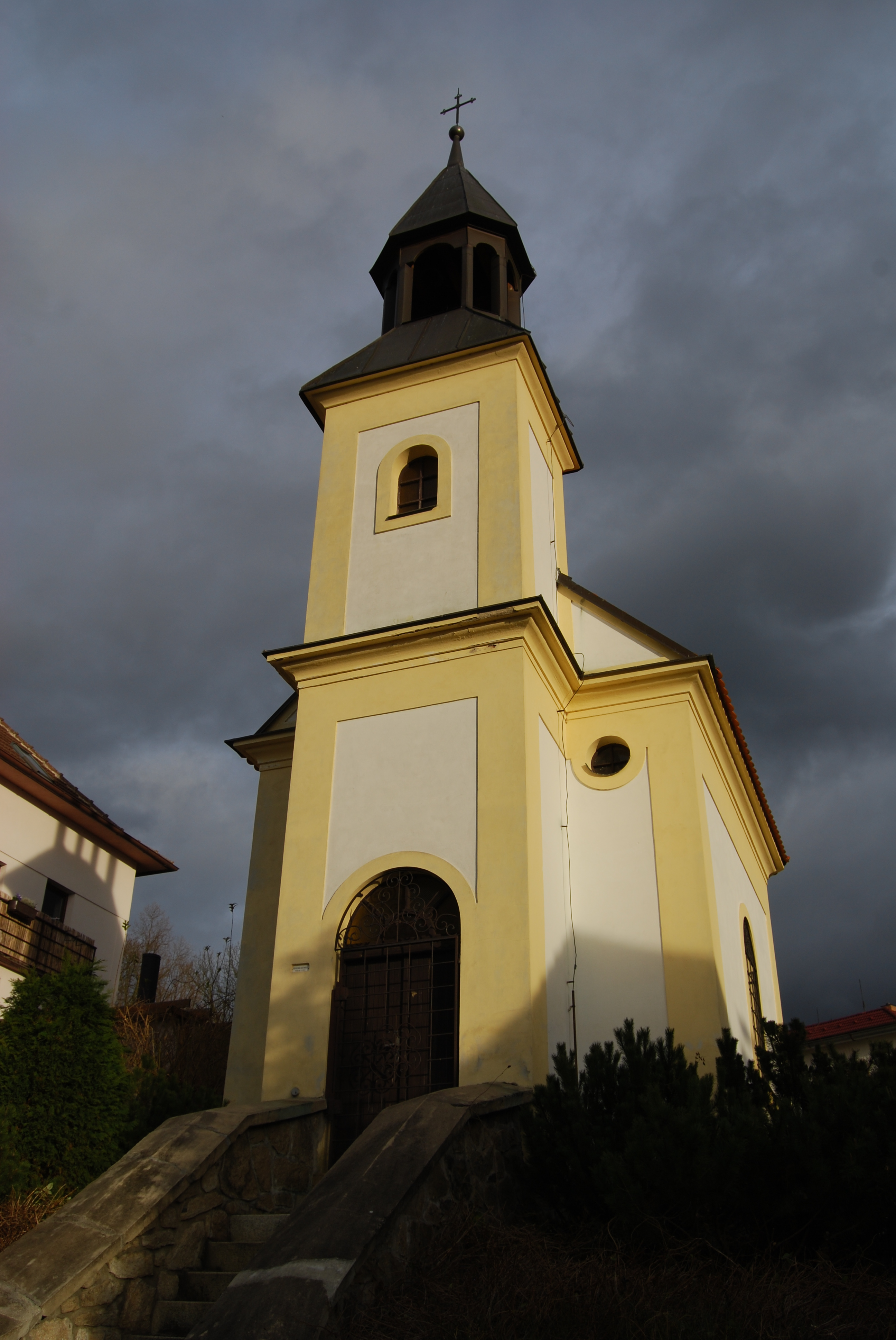 Kaple v obci. Paseky. Okres Písek. Česká republika.